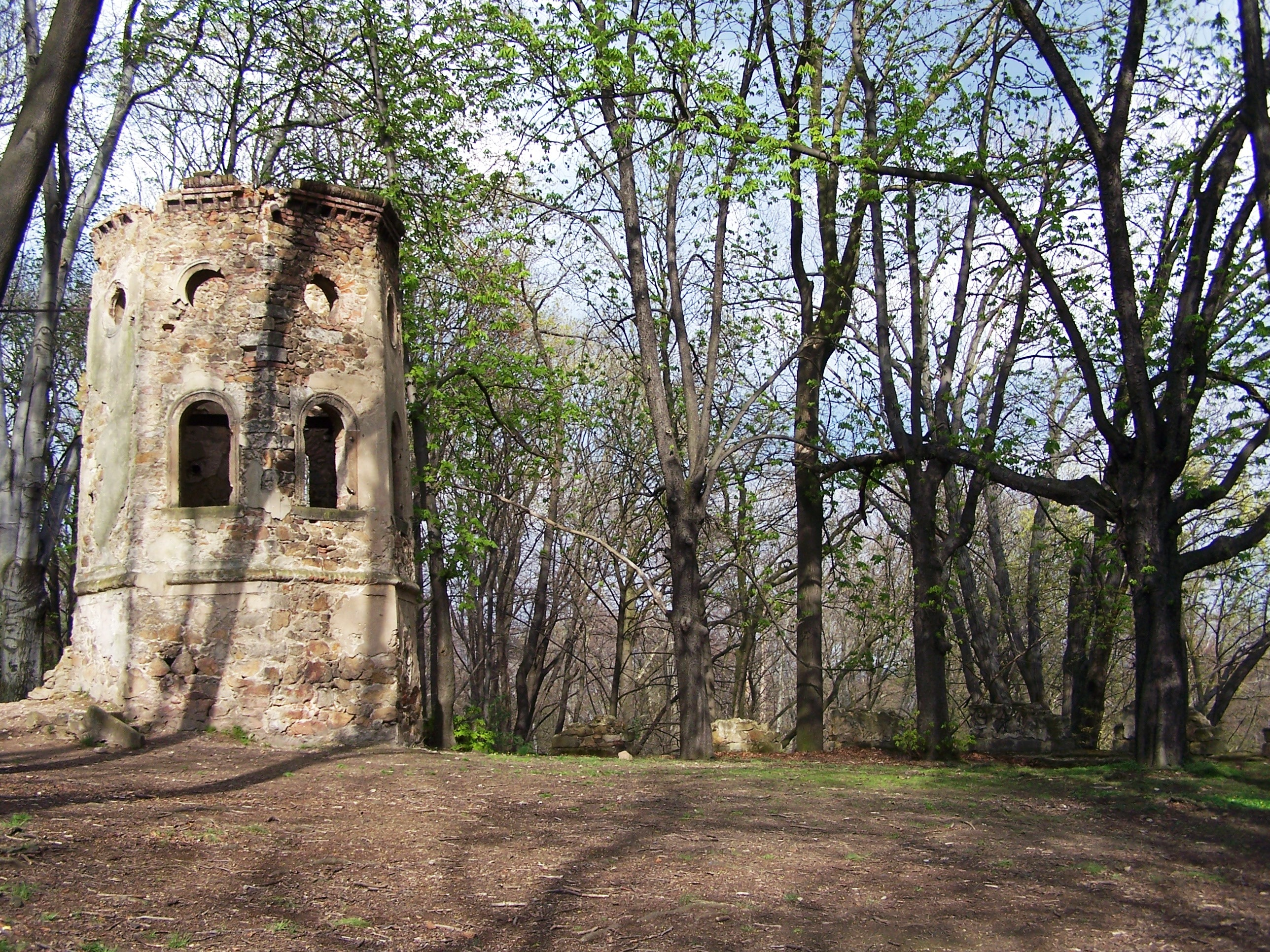 Radebeul, Augustusweg 110, Ruine des Aussichtsturms auf dem Jägerberg (oberhalb des Fiedlergrunds)